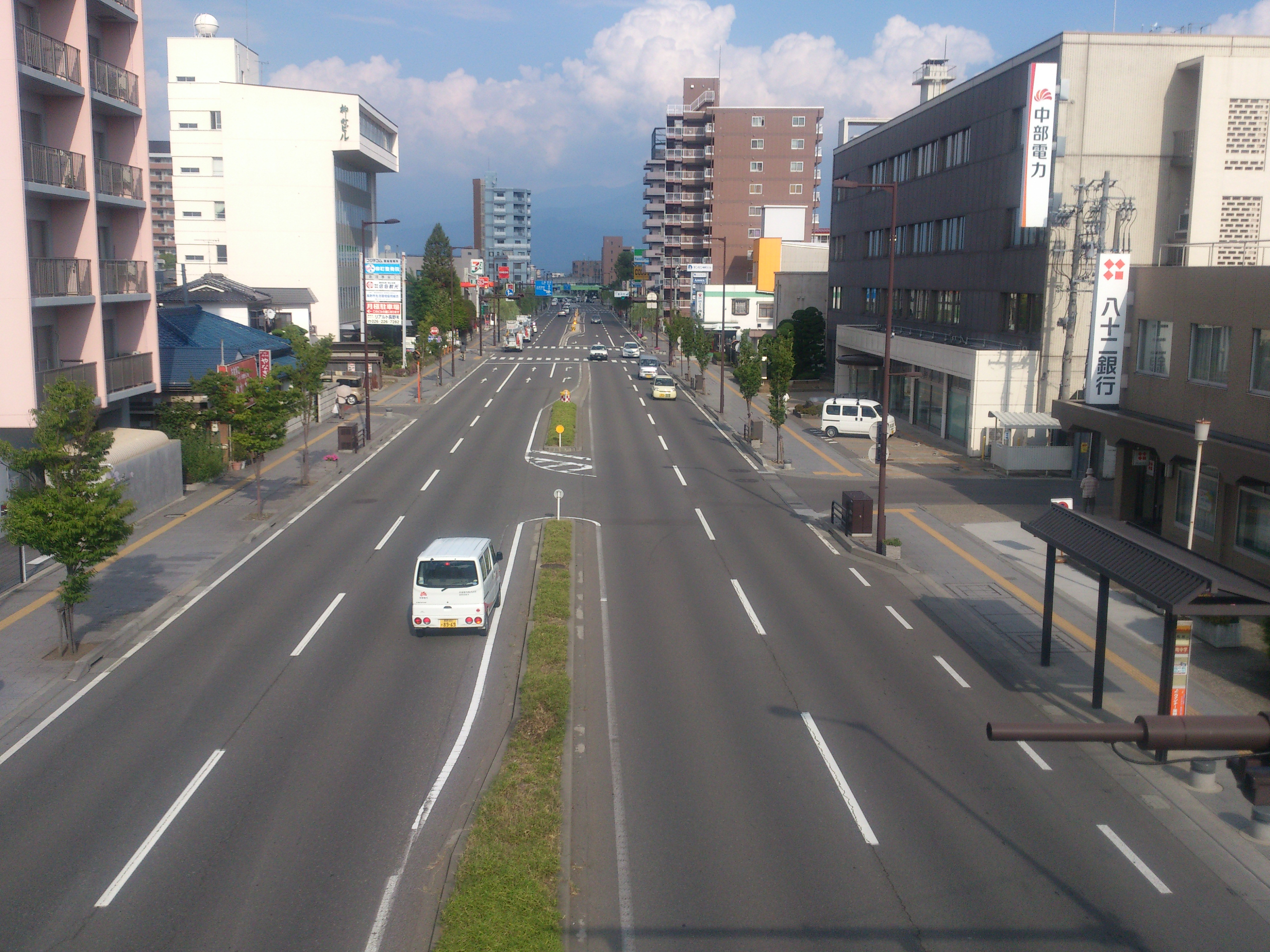 柳町通り・須坂方面（長野県長野市柳町）